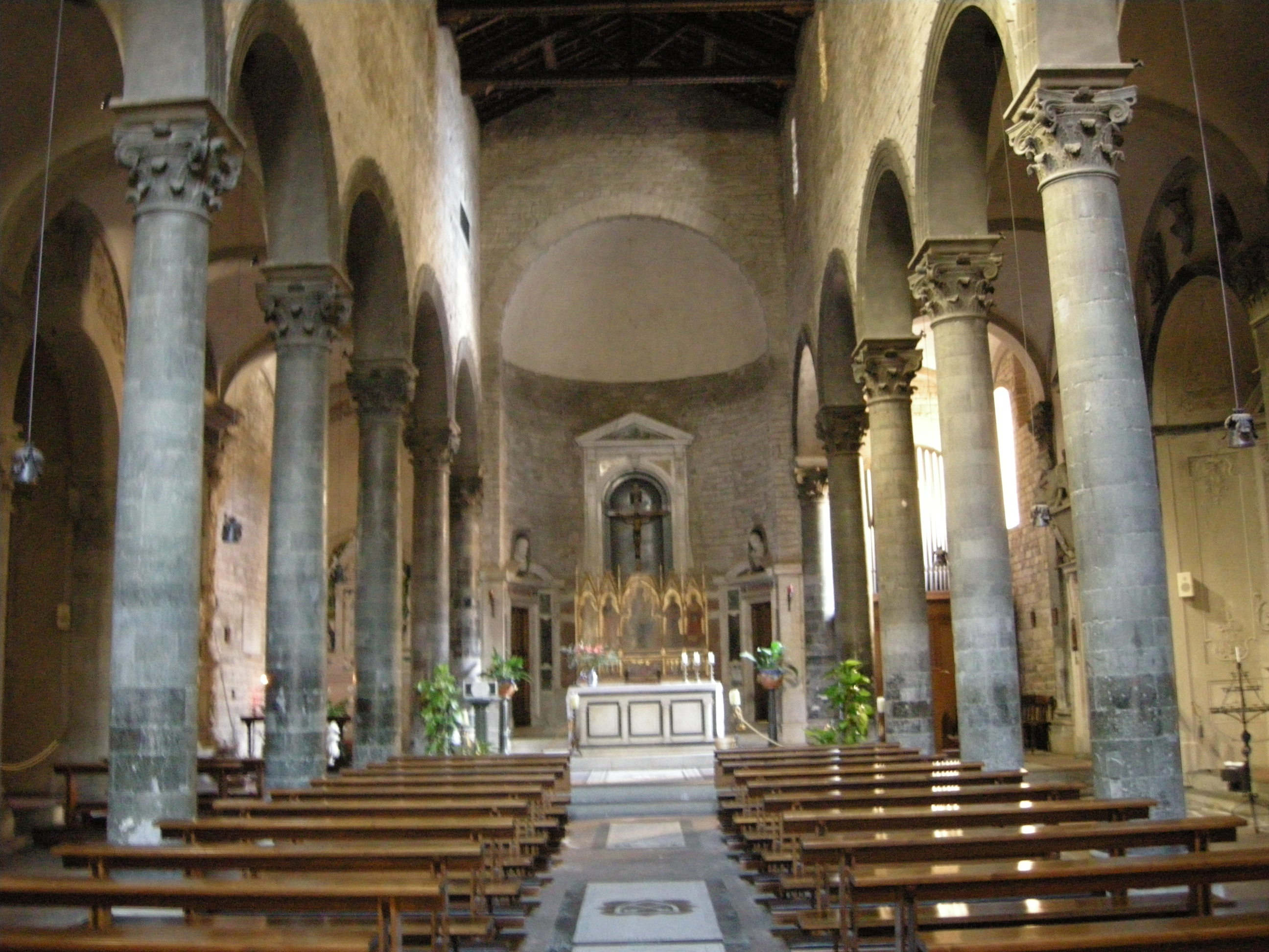 Santi apostoli, firenze, interno